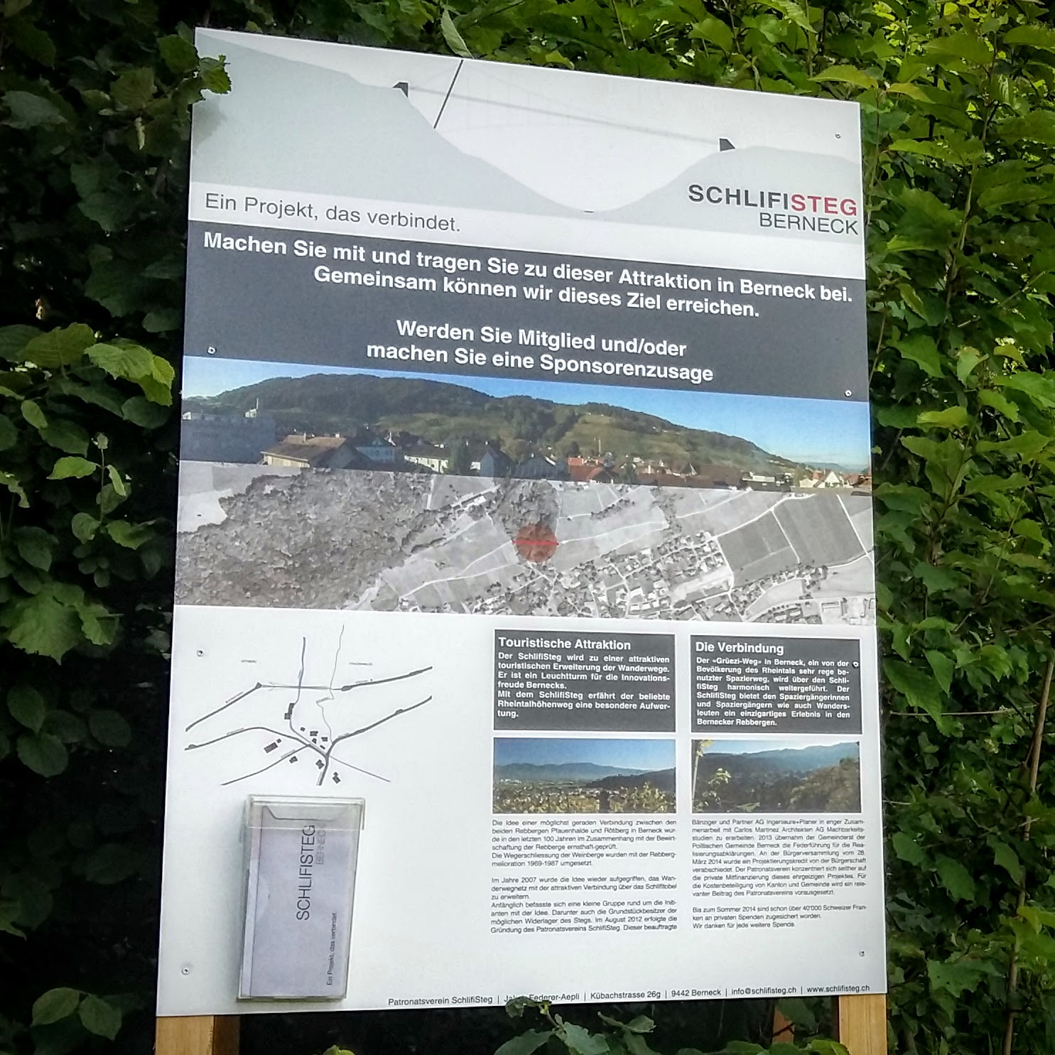 Die Informationstafel zum Projekt Schlifisteig